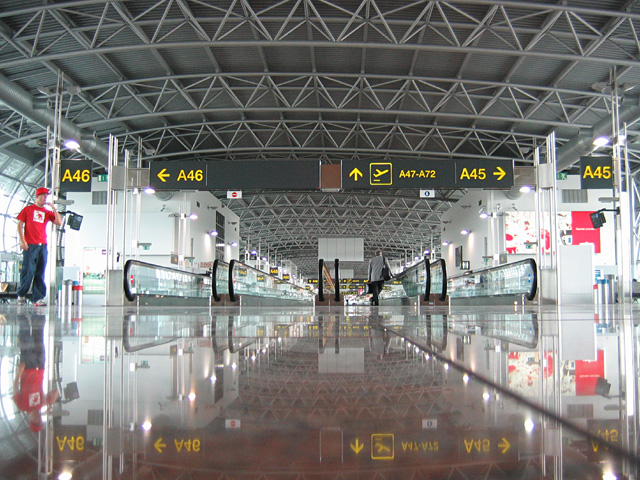 Spiegelbeeld van Pier A op de luchthaven van Zaventem